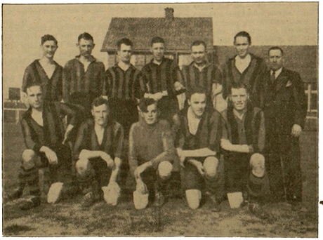 Het voetbalteam van VV Succes in 1935. Zittend van links naar rechts: H.Lont, A.Schotting, P.Posthumus, N.Koorn en L.Montulet. Staande van links naar rechts: D.Kuiper, H.Grootemaat, A.Schmitt, Th.Rijkers, Jn. Lont, C.Lont en de trainer Mr. Curtis. De ploeg wist na 2 wedstrijden tegen "De Meteoor" te promoveren naar de Derde Klasse KNVB.